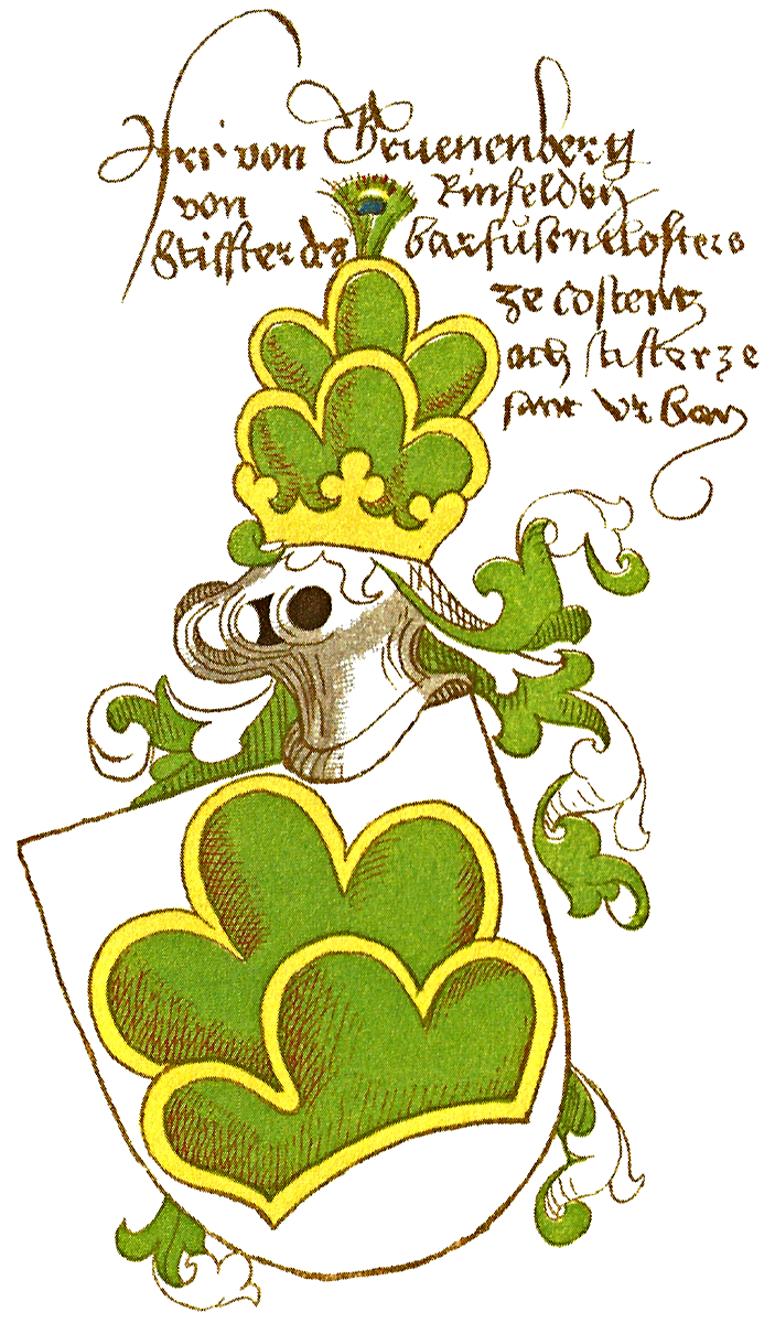 Wappen der Freiherren von Grünenberg im Wappenbuch von Conrad Grünenberg (15. Jahrhundert). In Silber ein grüner, goldumrahmter schwebender Sechsberg (3:3). Als Helmzier auf einer goldenen Freiherrenkrone eine Mütze aus dem gleichen Sechsberg, bekrönt mit einer Pfauenfeder. Die Helmdecken aussen Silber, innen Grün. Die Familie, von Rheinfelden (ab 15. Jh.), wird im Text als Stifter der Barfüsser von Konstanz und der Zisterze von St. Urban bezeichnet.